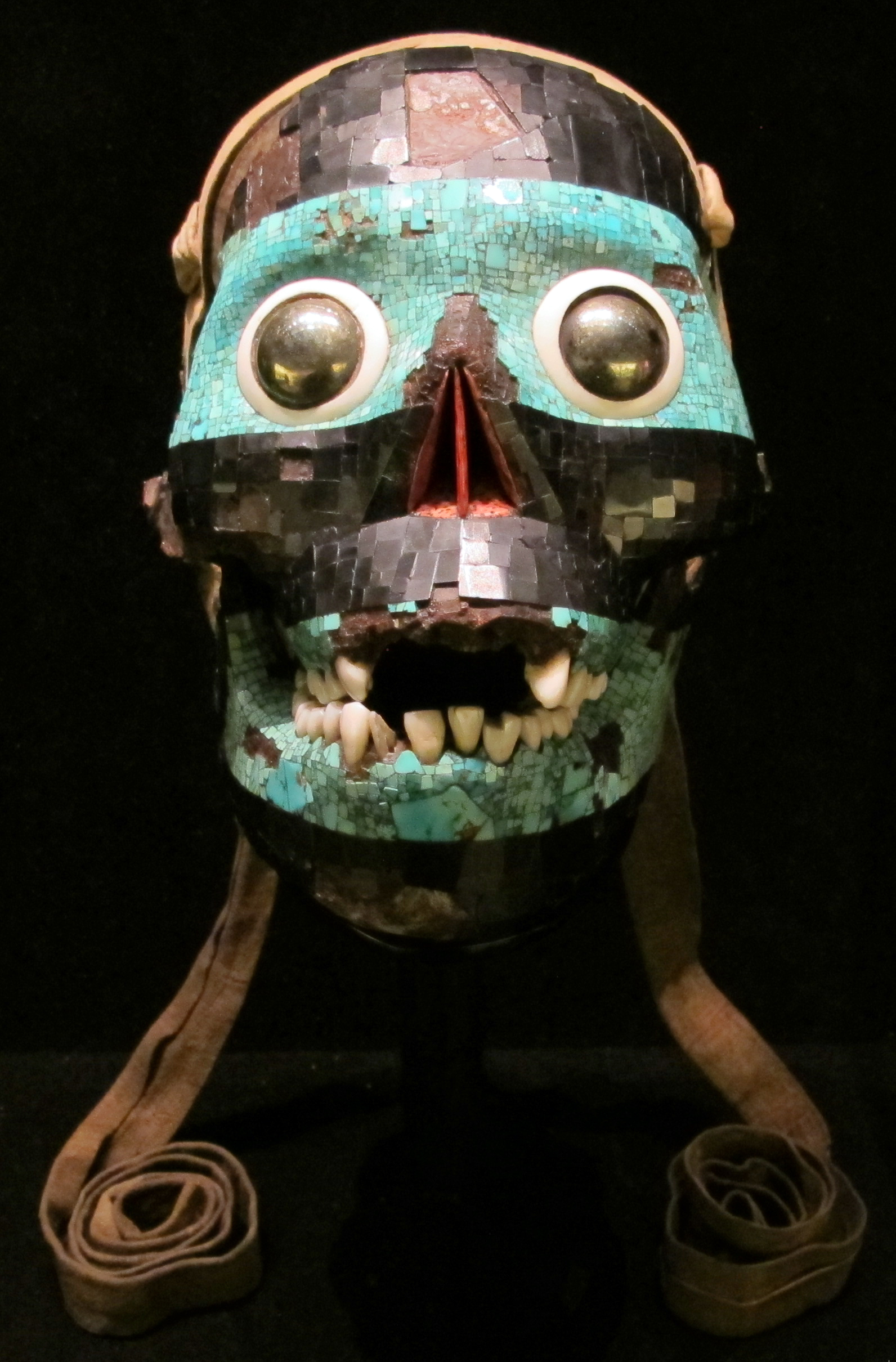 Mixtechi-aztechi, maschera di tezcatlipoca con mosaico in turchese, 1400-1521 circa, 0